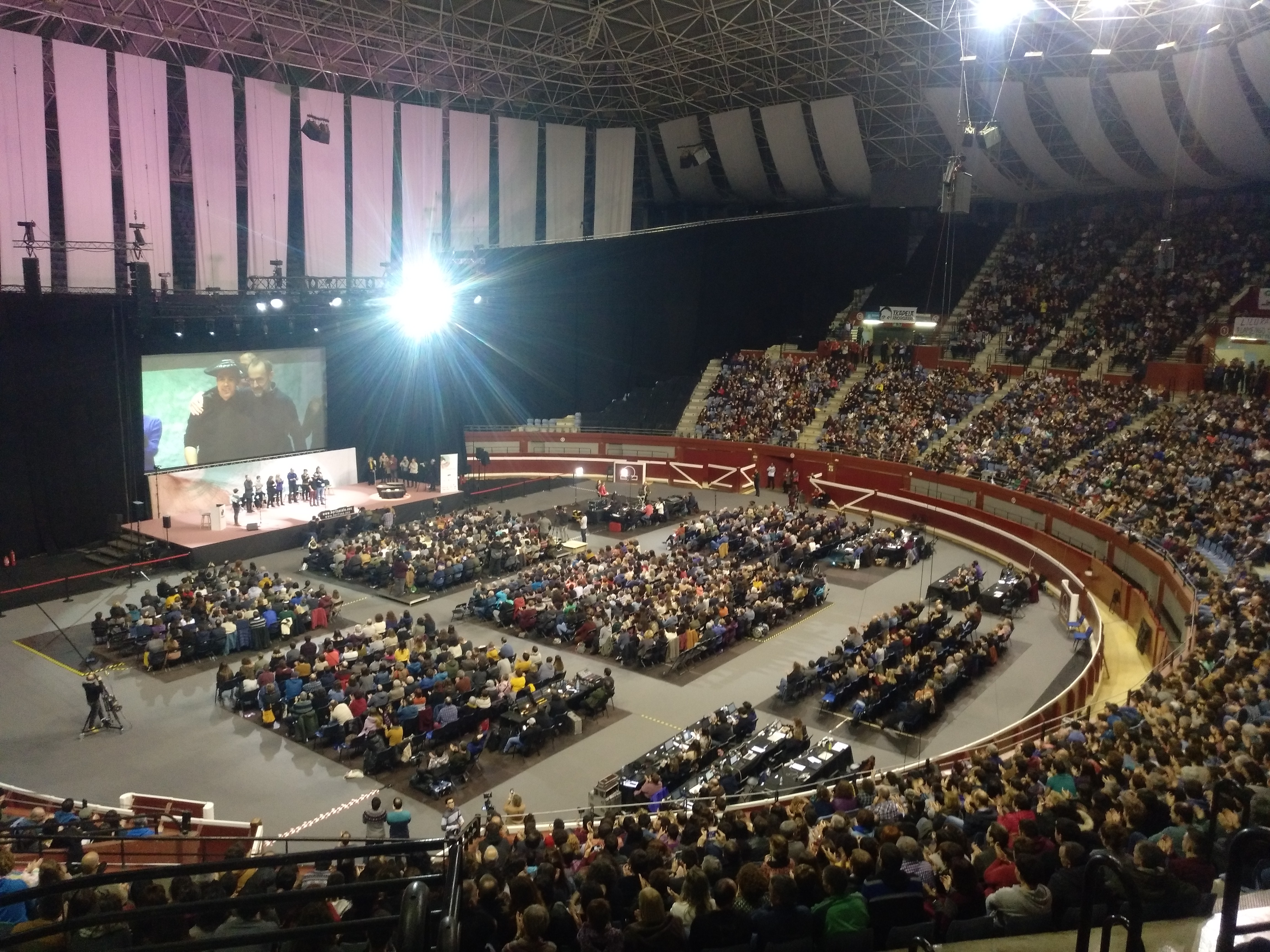 Gipuzkoako Bertsolari Txapelketa Illunbe zezen plazan, 219ko abenduaren 14an.